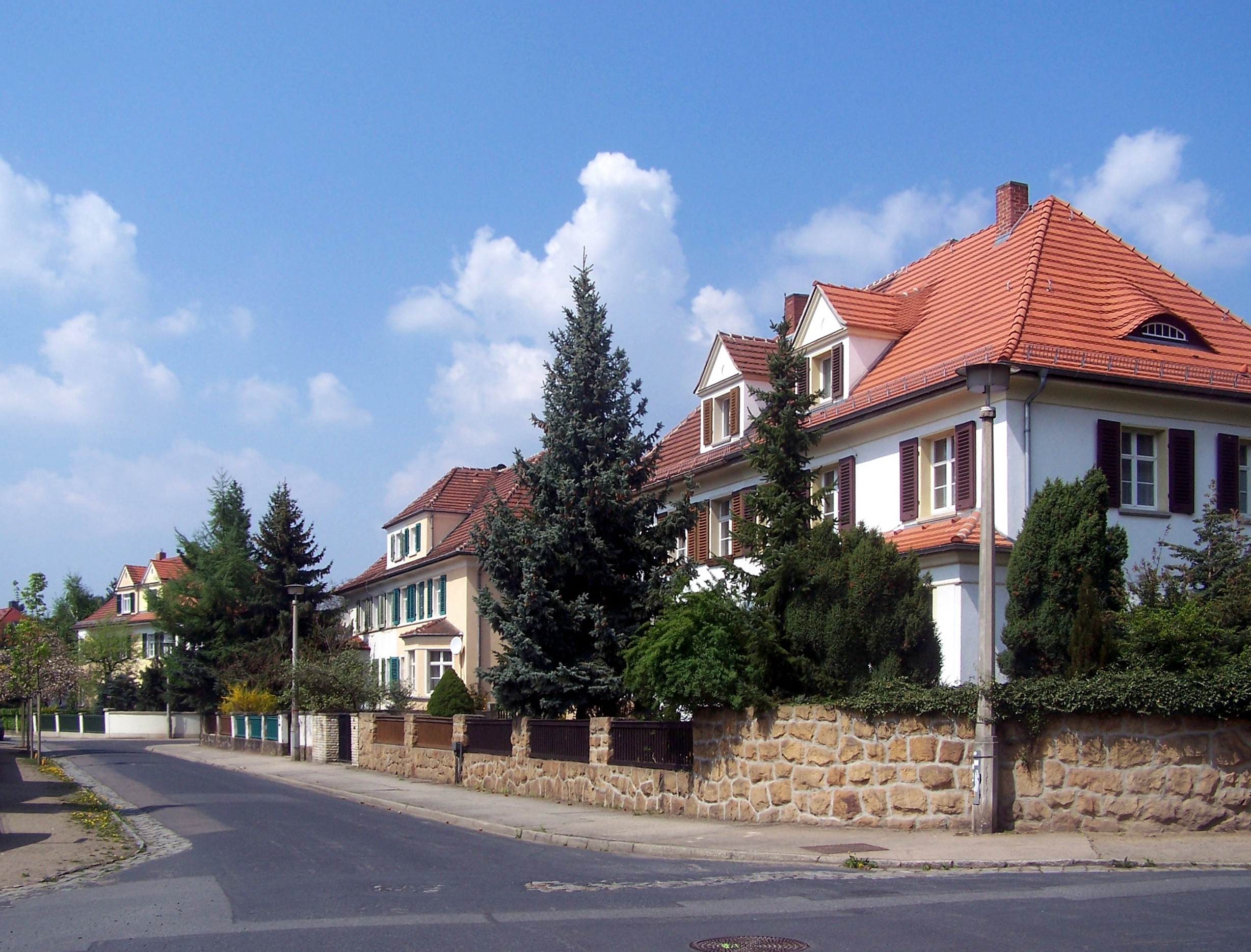 Radebeul, Doppelwohnhäuser Schillerstraße 16 / Karl-Marx-Straße 14, Schillerstraße 14 / Kantstraße 1, Schillerstraße 12 / Kantstraße 2